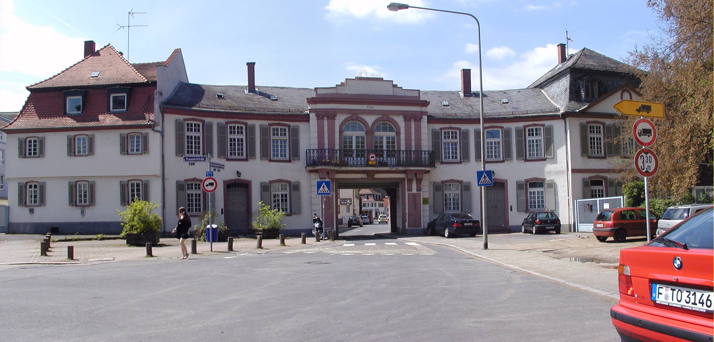 Frauenhoftor von Osten